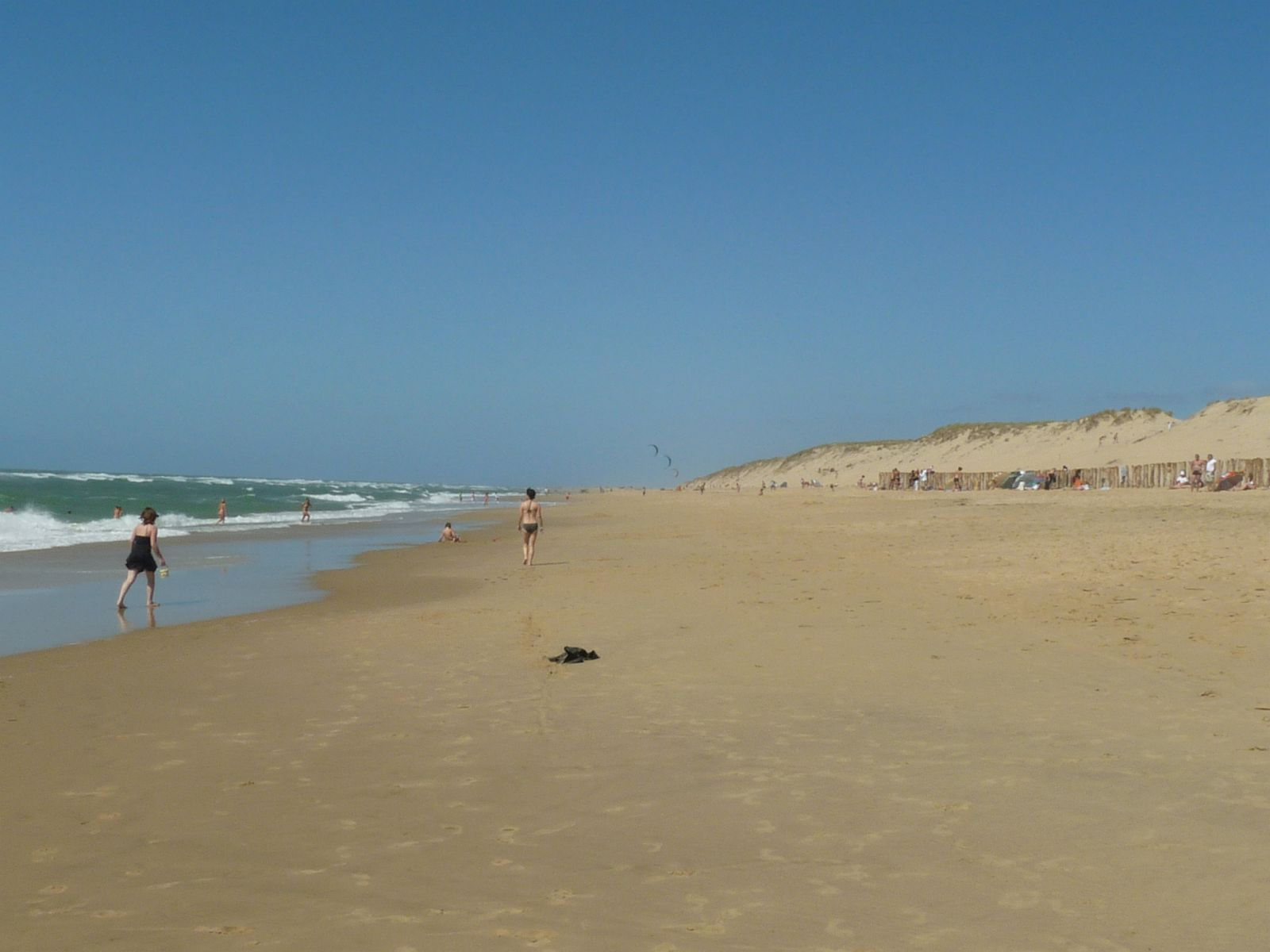 Plage de la Côte Sauvage au phare de la Coubre (17), France